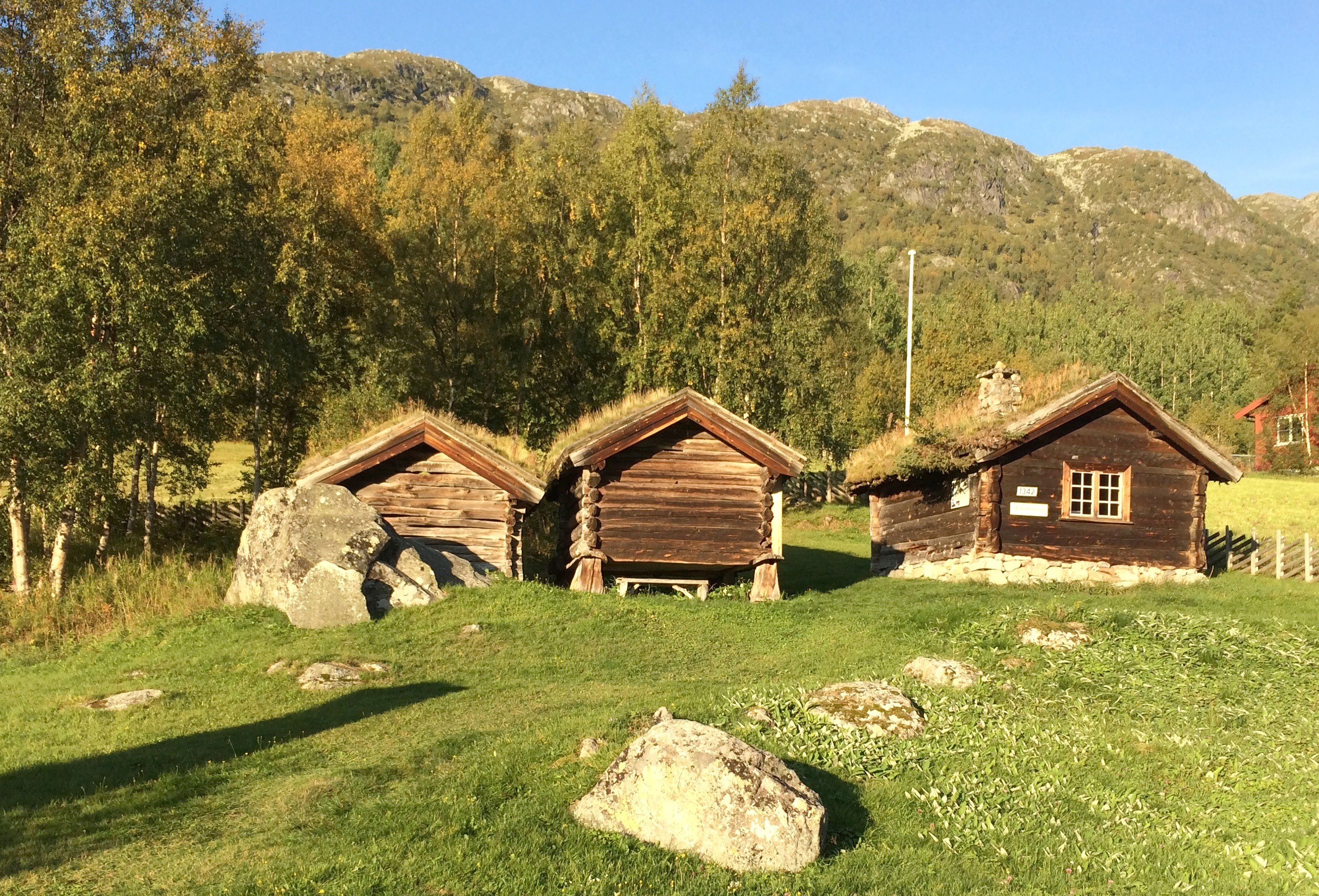 Myllarheimen i Arabygdi